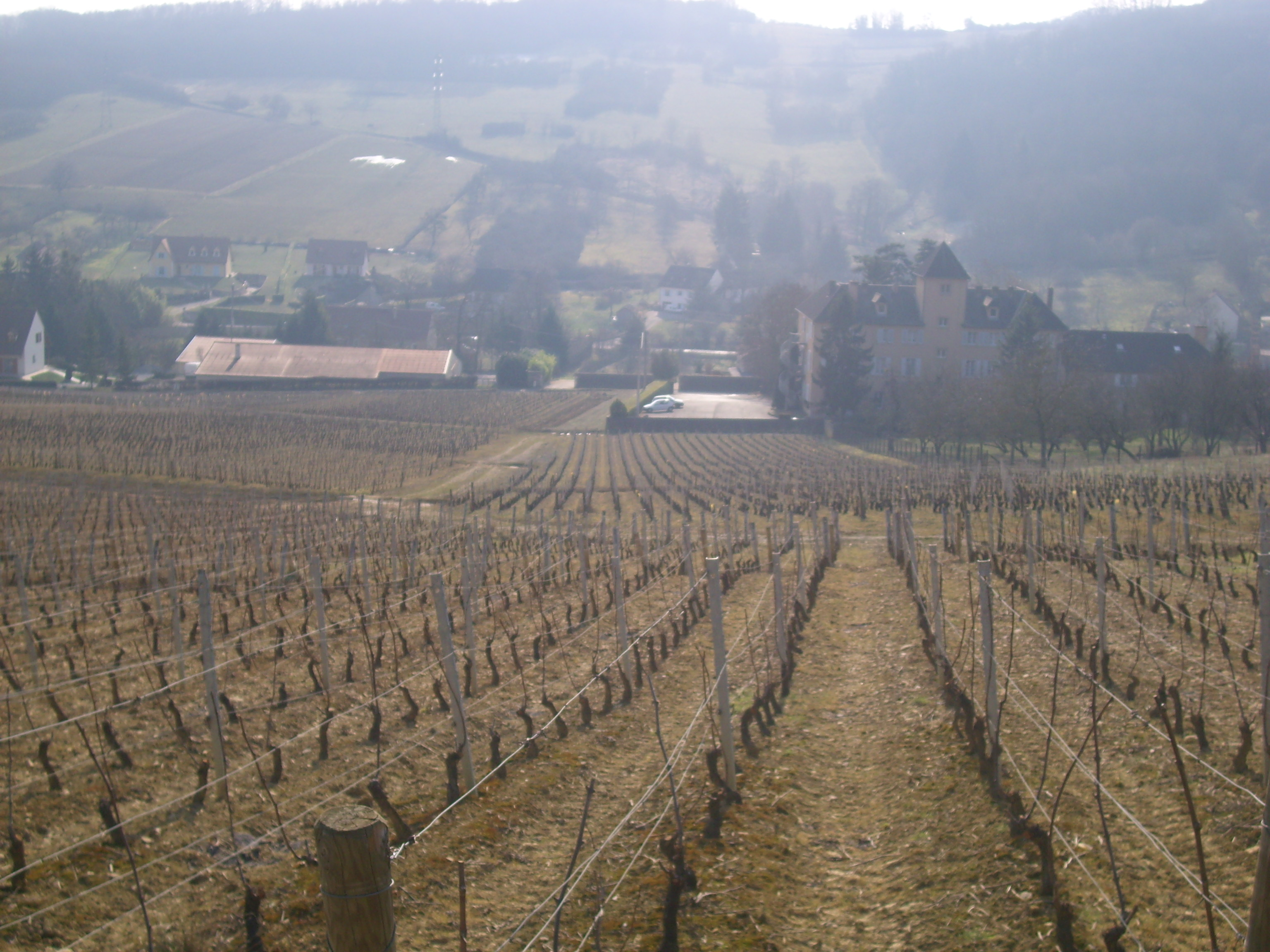 Vue d'une partie des vignes à Jambles (71)